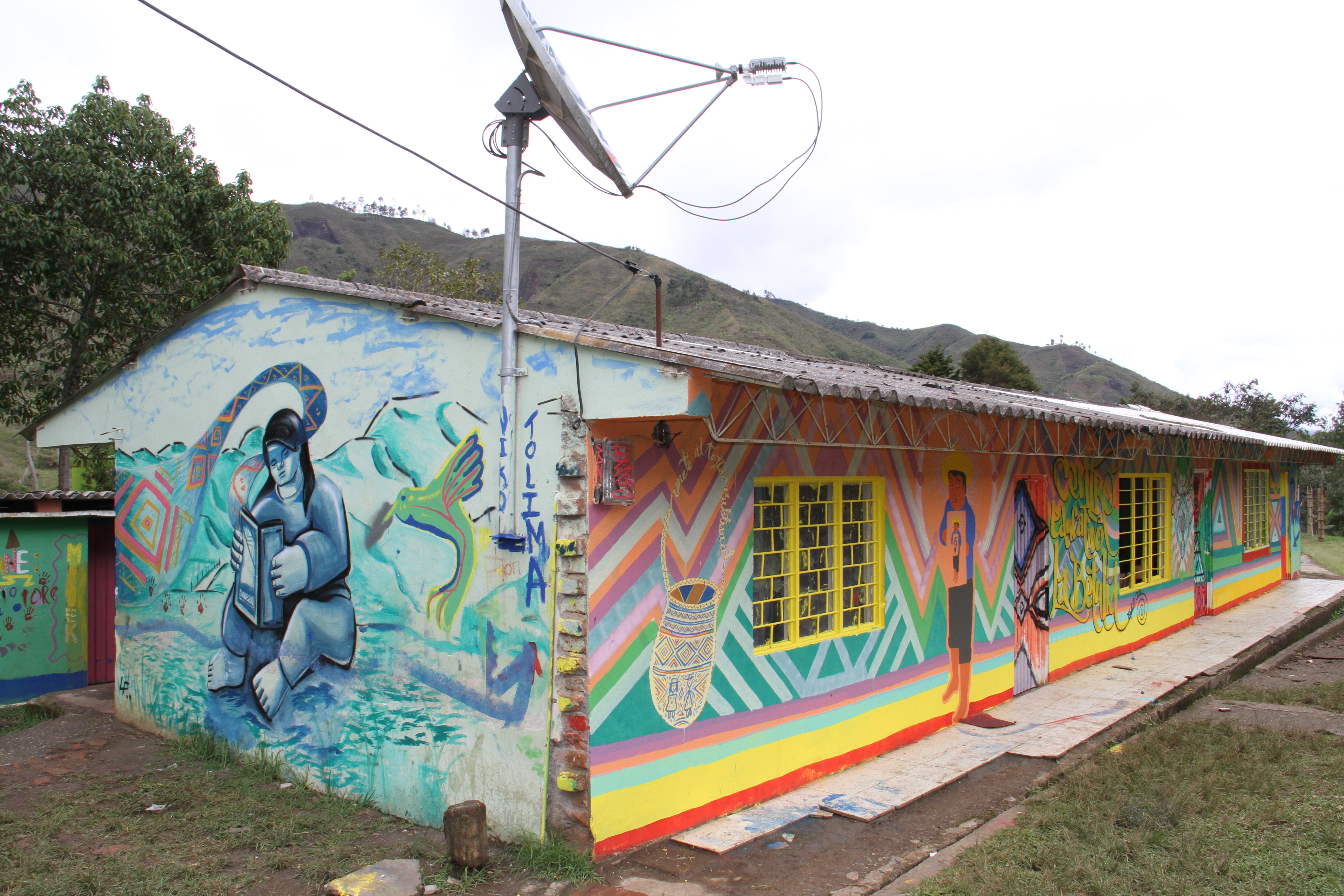 Cauca Toribio la Bertulia Somos-muiscas-XNO-iskra